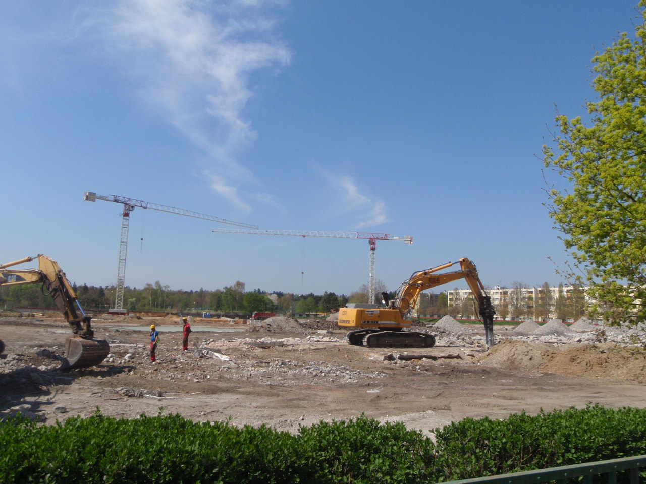 Haladás Stadion lebontva 2016 04